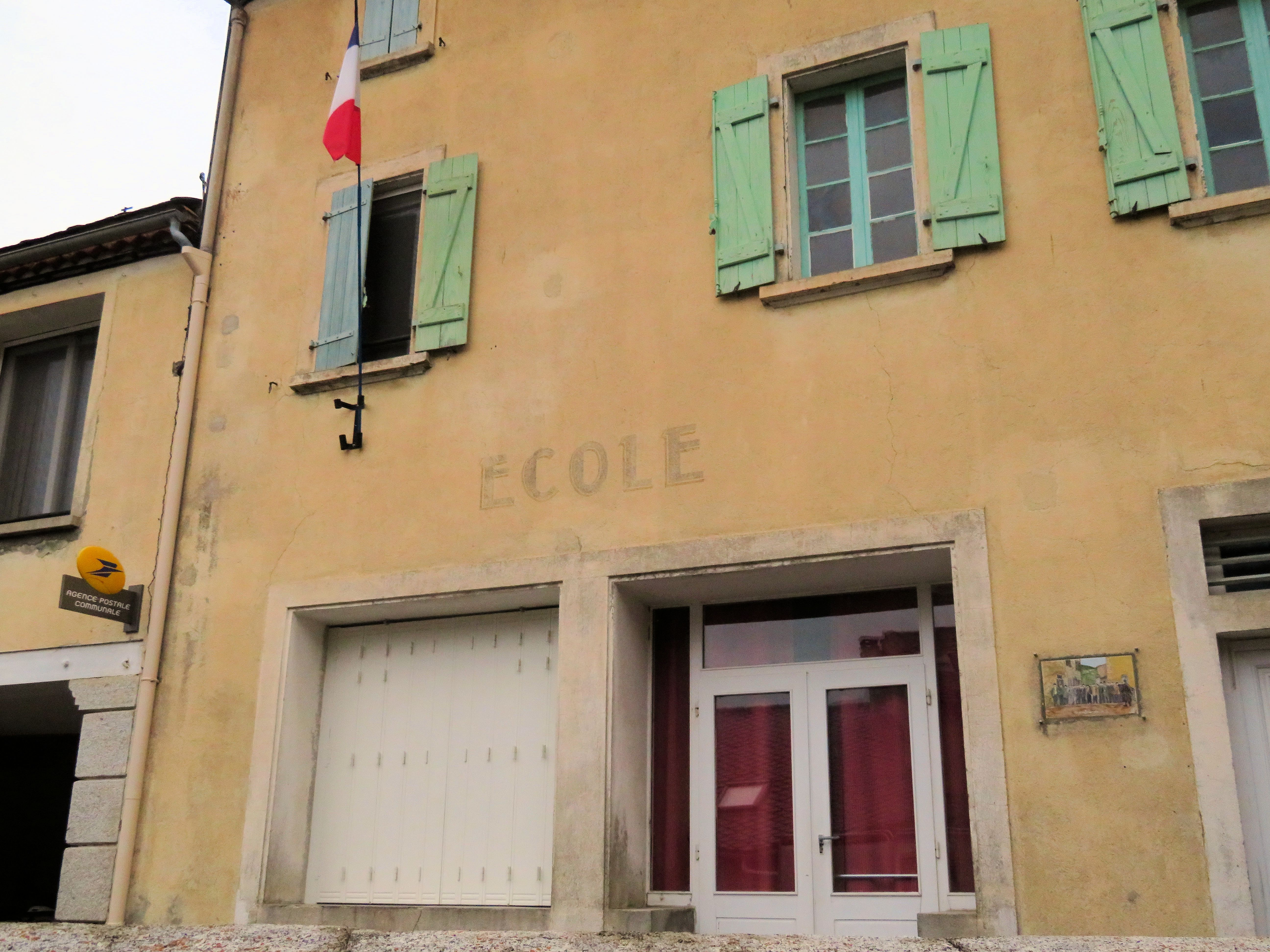 ancienne école communale